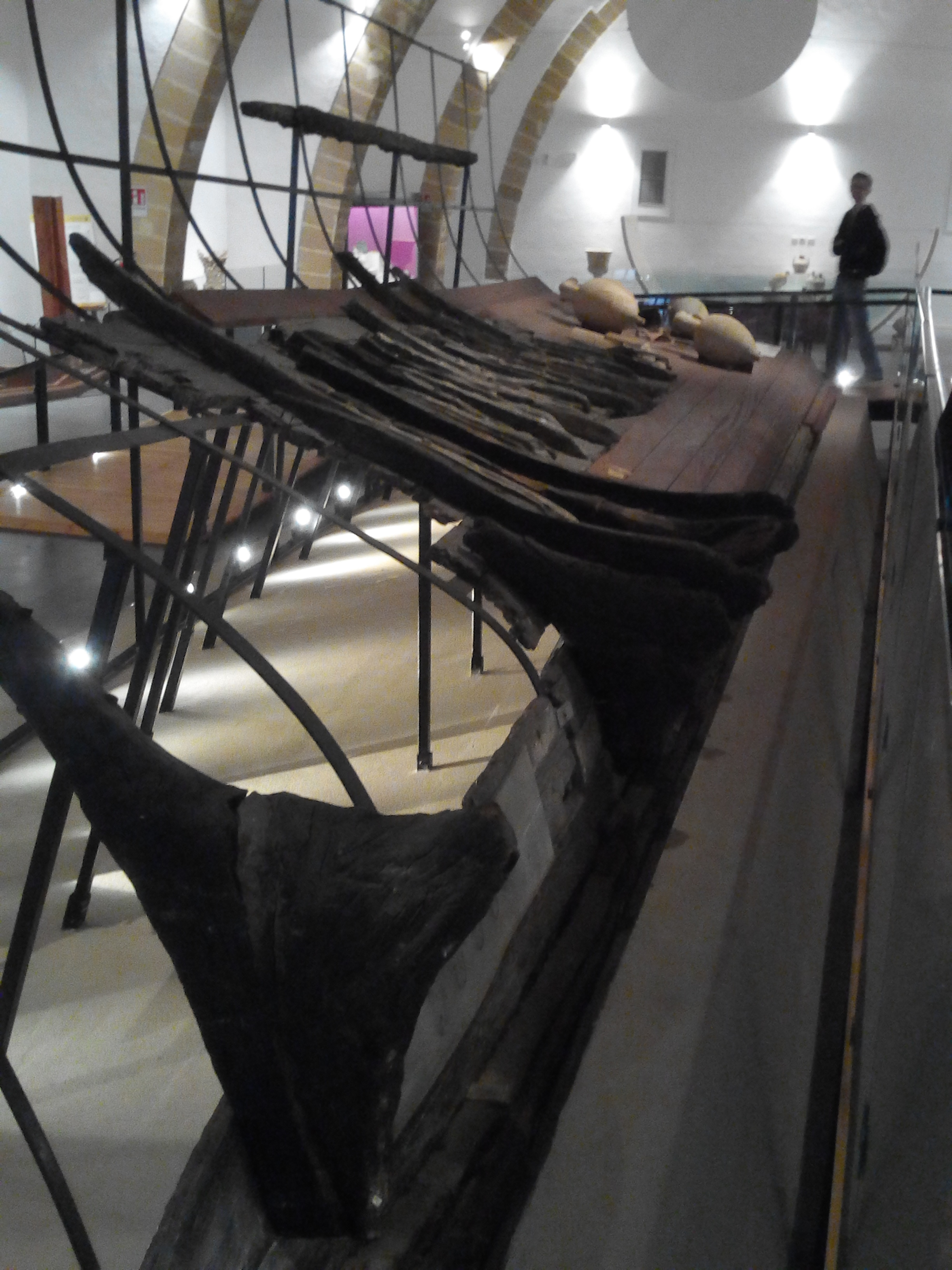 La nave punica al museo archeologico Baglio Anselmi di MArsala